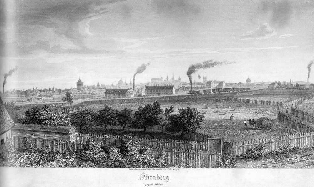 Ansicht Nürnbergs von Süden: Die Bahnlinie Nürnberg-Bamberg, dahinter die Zeltnersche Ultramarinfabrik an der heutigen Zeltnerstraße, die Altstadt und die Burg